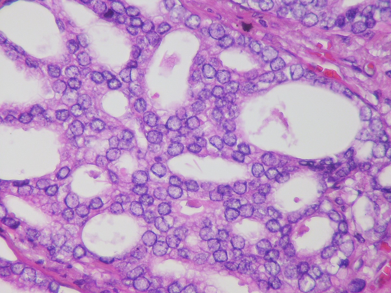 Metastatic prostatic adenocarcinoma Case 167